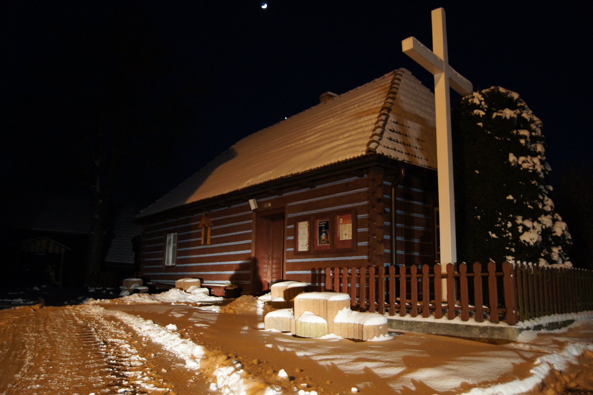 Zabawa (powiat tarnowski) - dom bł. Karoliny Kózkówny